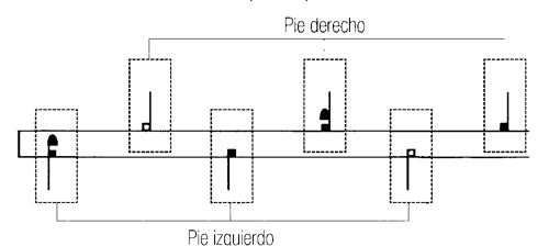 Explicación de la notación de zapateado flamenco creada por Rosa De las Heras. En la línea superior se sitúa la posición del pie derecho y en la inferior, la de pie izquierdo.